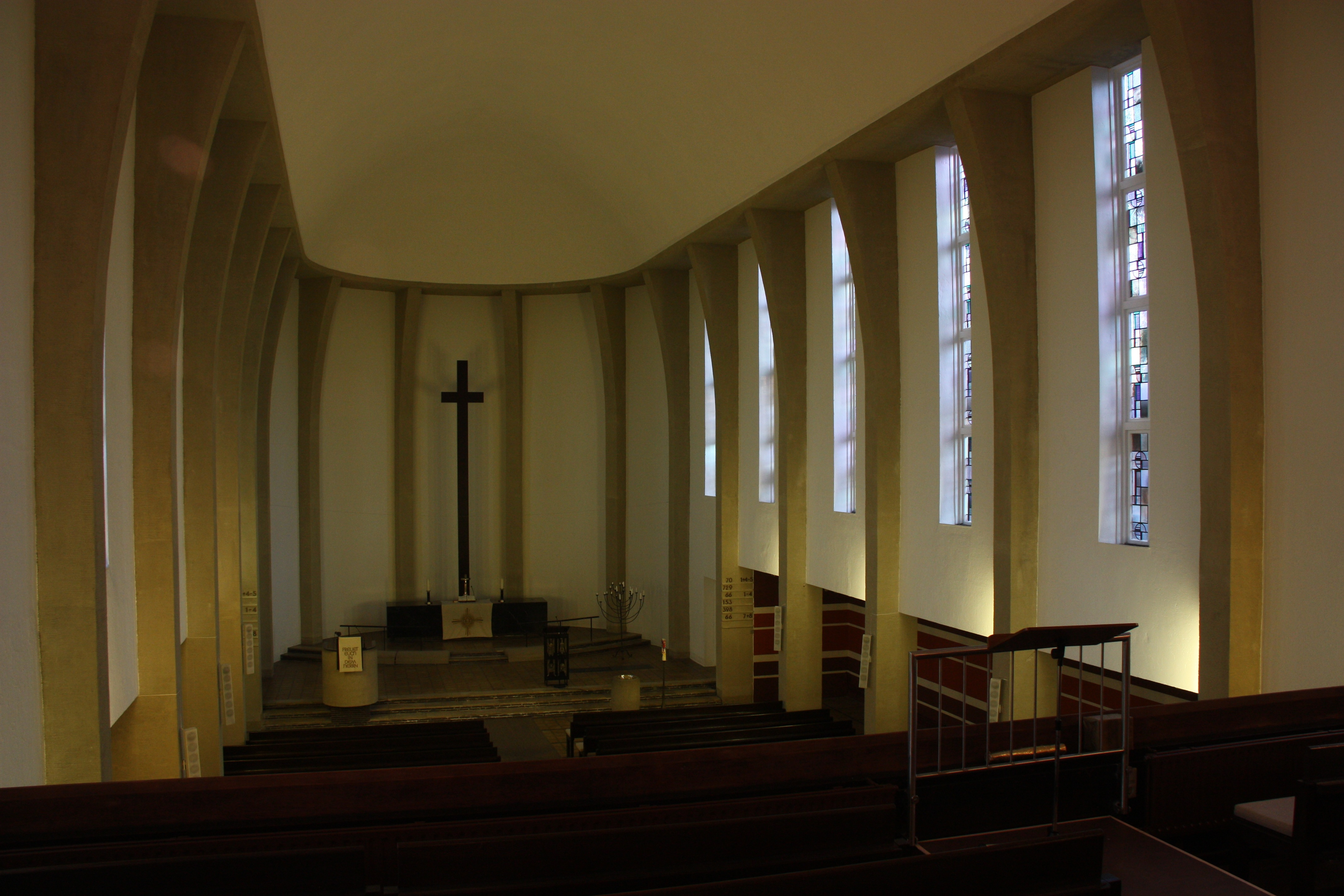 Hamburg-Langenhorn, Ansgarkirche, Innenraum